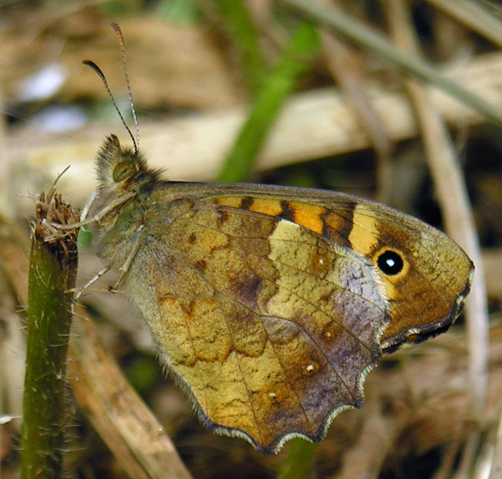 self made. Bastabales - Galicia - Spain